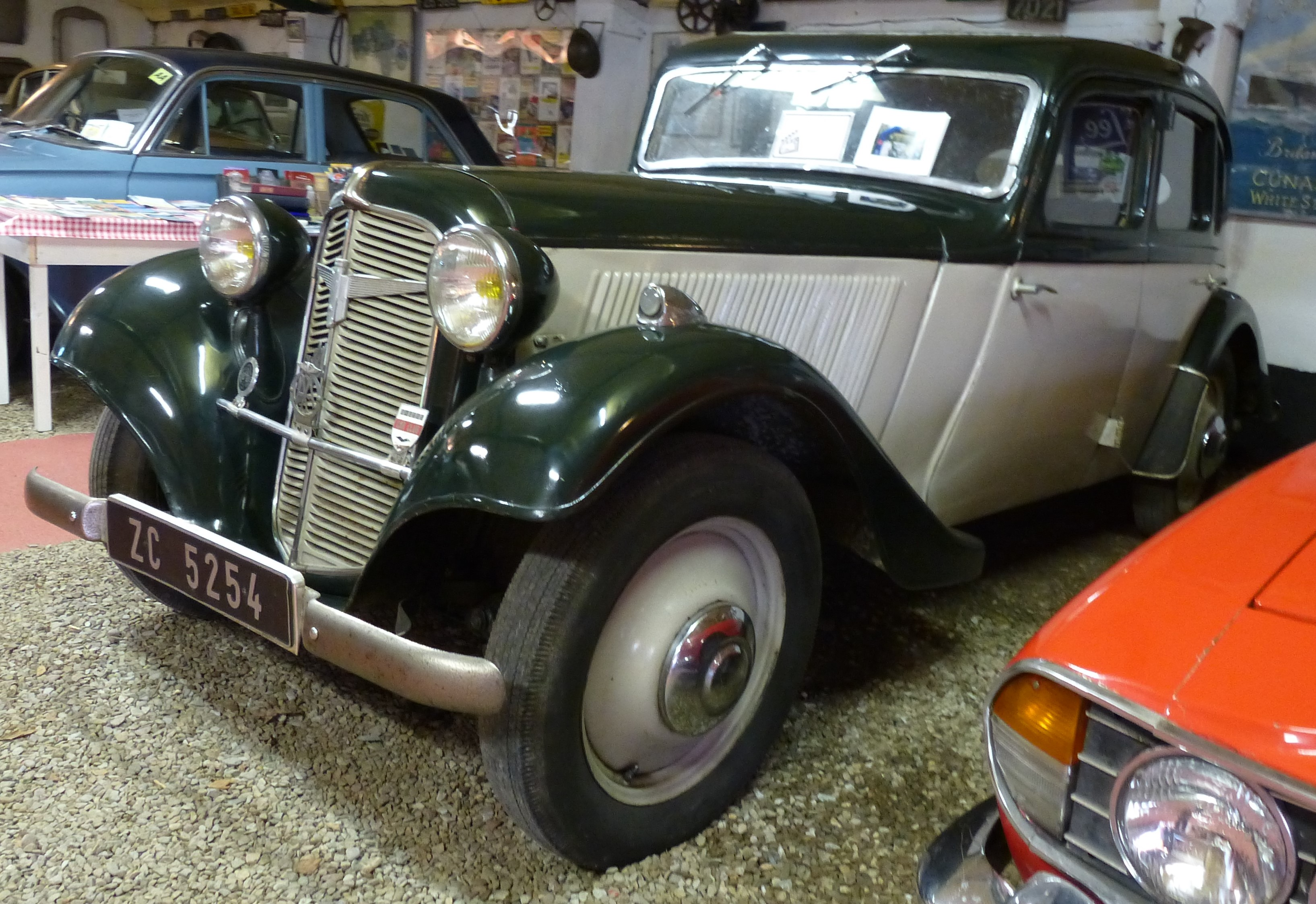 Adler Trumpf Junior von 1936 von Irish Exporters & Importers aus Irland